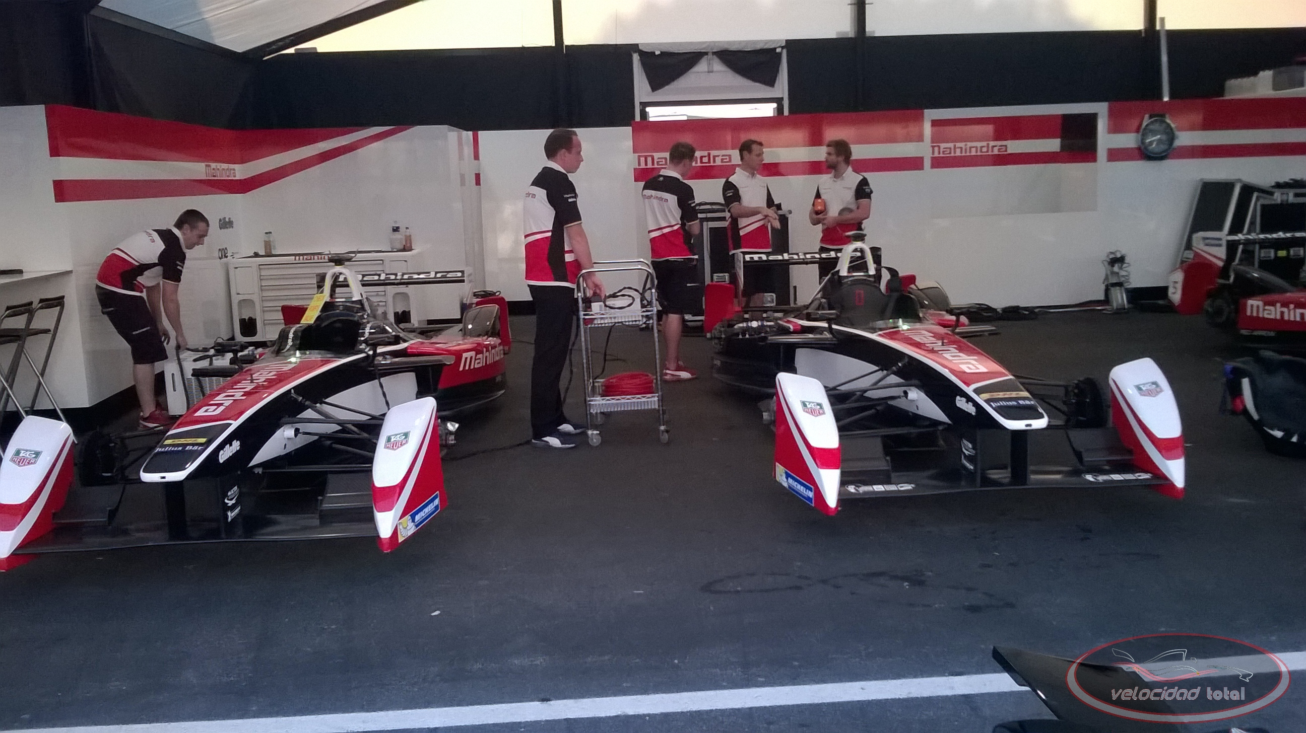 Solo se permite el uso de esta imagen mencionando a Velocidad Total como su autor. Imagen del equipo Mahindra Racing de Fórmula E, durante el Punta del Este ePrix de 2014.